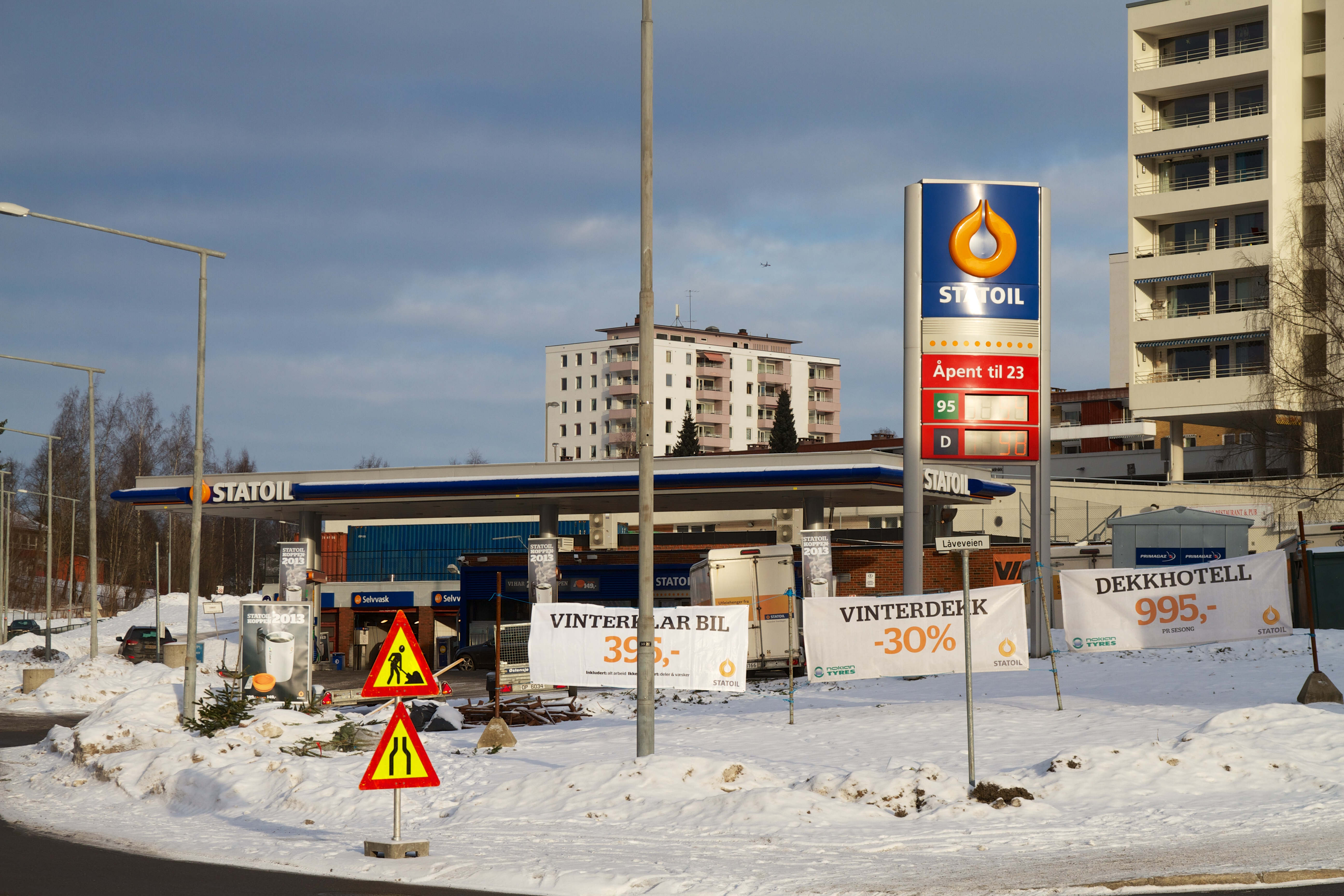 Statiol Østensjø.